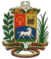 Ley del 15 de julio de 1930. Articulo 9°- El Escudo de Armas de los Estados Unidos de Venezuela llevará en su campo los colores del Pabellón Nacional en tres cuarteles. El cuartel de la derecha será rojo y contendrá un manojo de mieses que simbolizarán la unión de los Estados de la República y la riqueza de su suelo. El cuartel de la izquierda será amarillo como emblema del triunfo levará armas y dos pabellones nacionales enlazados con una corona de laurel. El tercer cuartel será azul, ocupará toda la parte inferior del Escudo y contendrá de derecha a izquierda, pero mirando hacia la derecha, un caballo indómito blanco, como símbolo de la Independencia y Libertad. El Escudo tendrá por timbre en su parte superior el emblema de la abundancia, con dos cornucopias vueltas para abajo, llenas de frutas y flores de los países fríos, templados y cálidos. En la parte inferior llevará una rama de olivo y una palma atadas con cintas con los colores del Pabellón Nacional. La cinta azul llevará las siguientes inscripciones, en letras de oro, a la derecha: «19 de abril de 1810 - Independencia». A la izquierda: «20 de febrero de 1859 - Federación»; y en el centro «E.E.U.U. de Venezuela».